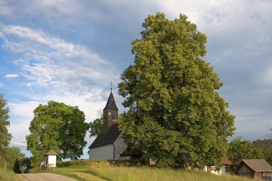 Kath. Filialkirche hl. Petrus und Kirchhof, St. Urban, Kärnten.